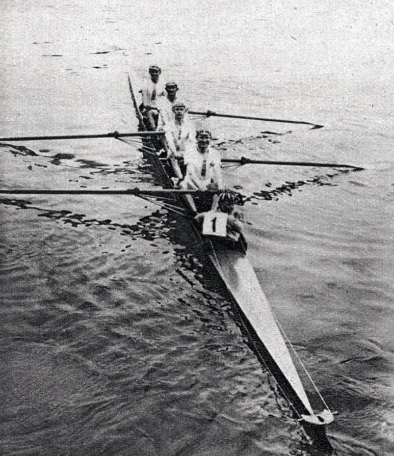 Le 'Quatre' seniors de l'Émulation de Boulogne (Raymond Talleux, Eugène Constant, Louis Gressier et Georges Lecointe, barreur Marcel Lepan), en juin 1924, vainqueur des Régates Pré-Olympiques.